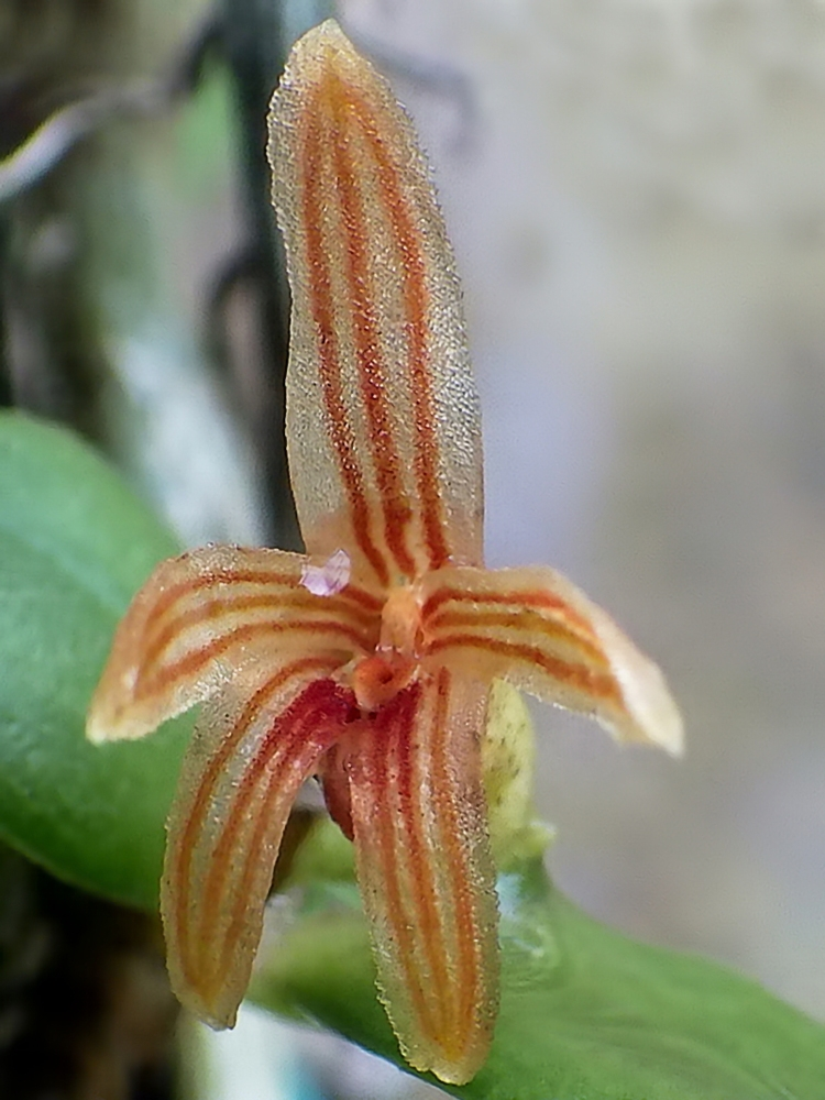 Fleur petite, brunâtre, nervation foncée.